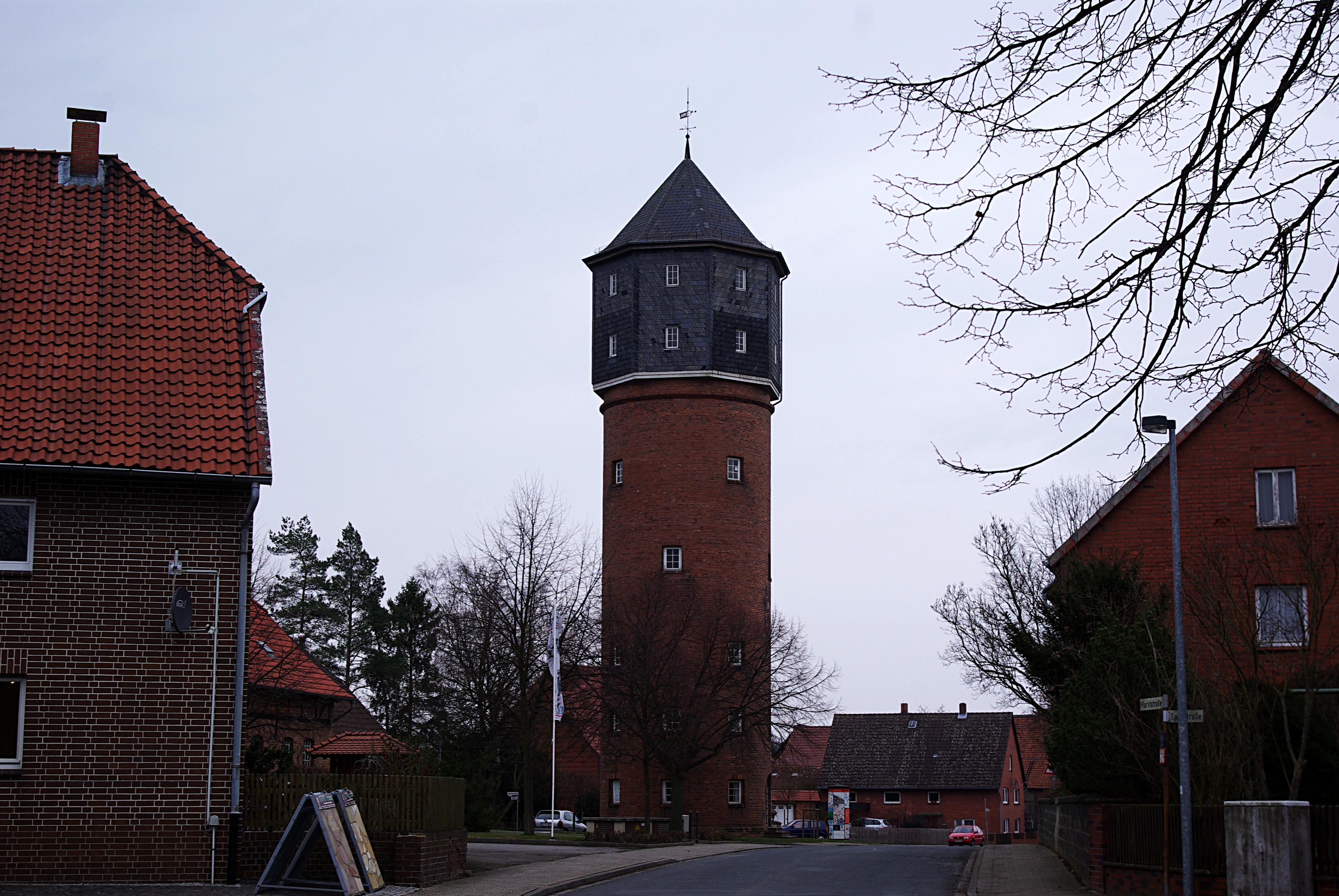 Groß Lafferde, Landkreis Peine in Niedersachsen. Der Wasserturm im Ort. Geotags in den Exif-Daten.